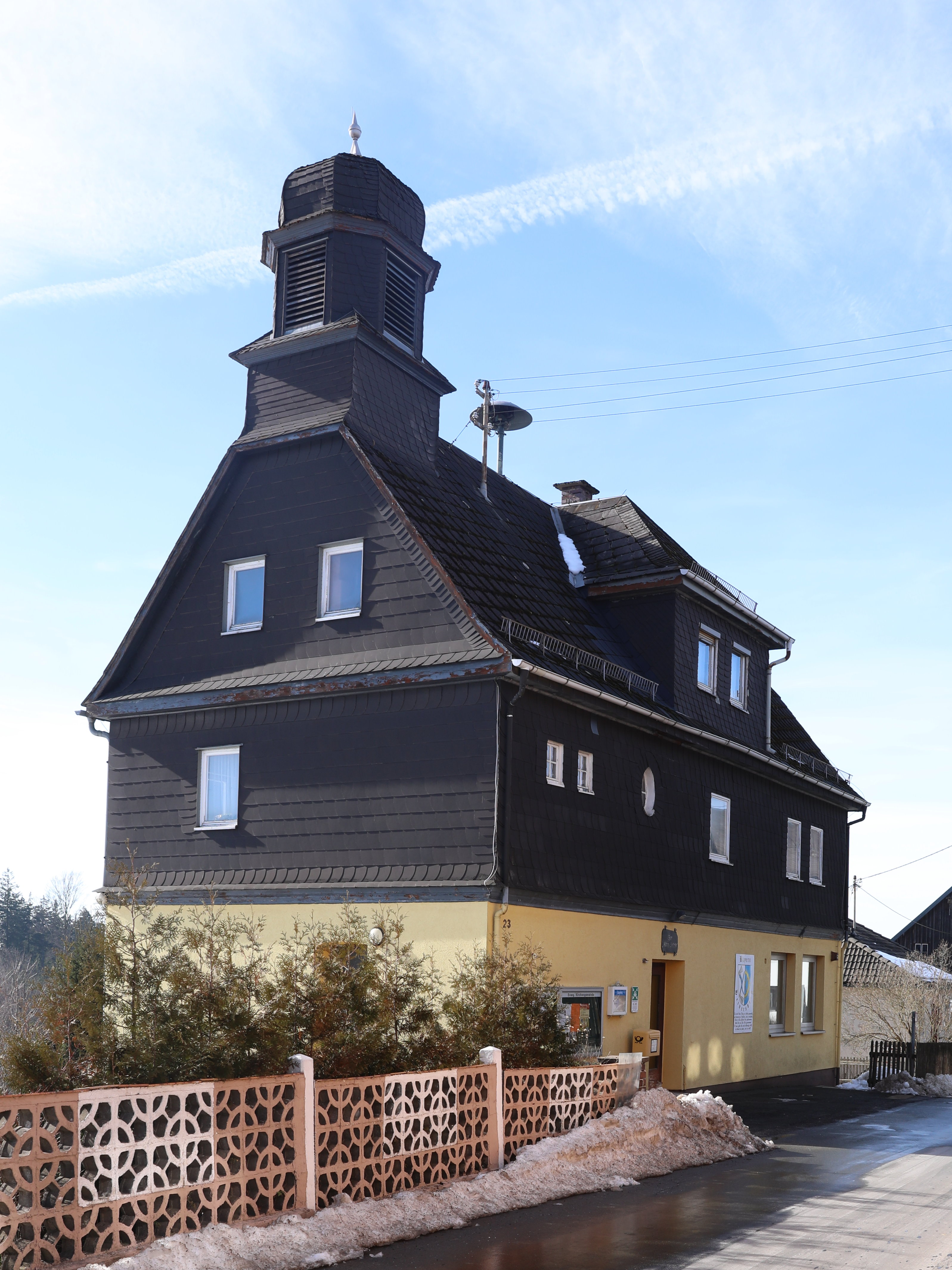 Alte Schule in Heinersberg, Ot von Nordhalben